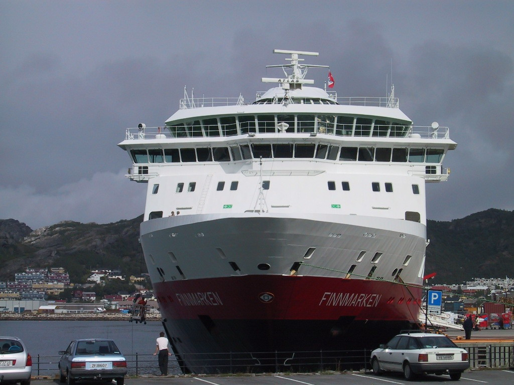 Description: Die MS Finnmarken der Hurtigruten im Hafen von Bodø Date: 8. Aug 2004 Author: HenHei Source: Bild:MS_Finnmarken.JPG Uploader: sgm